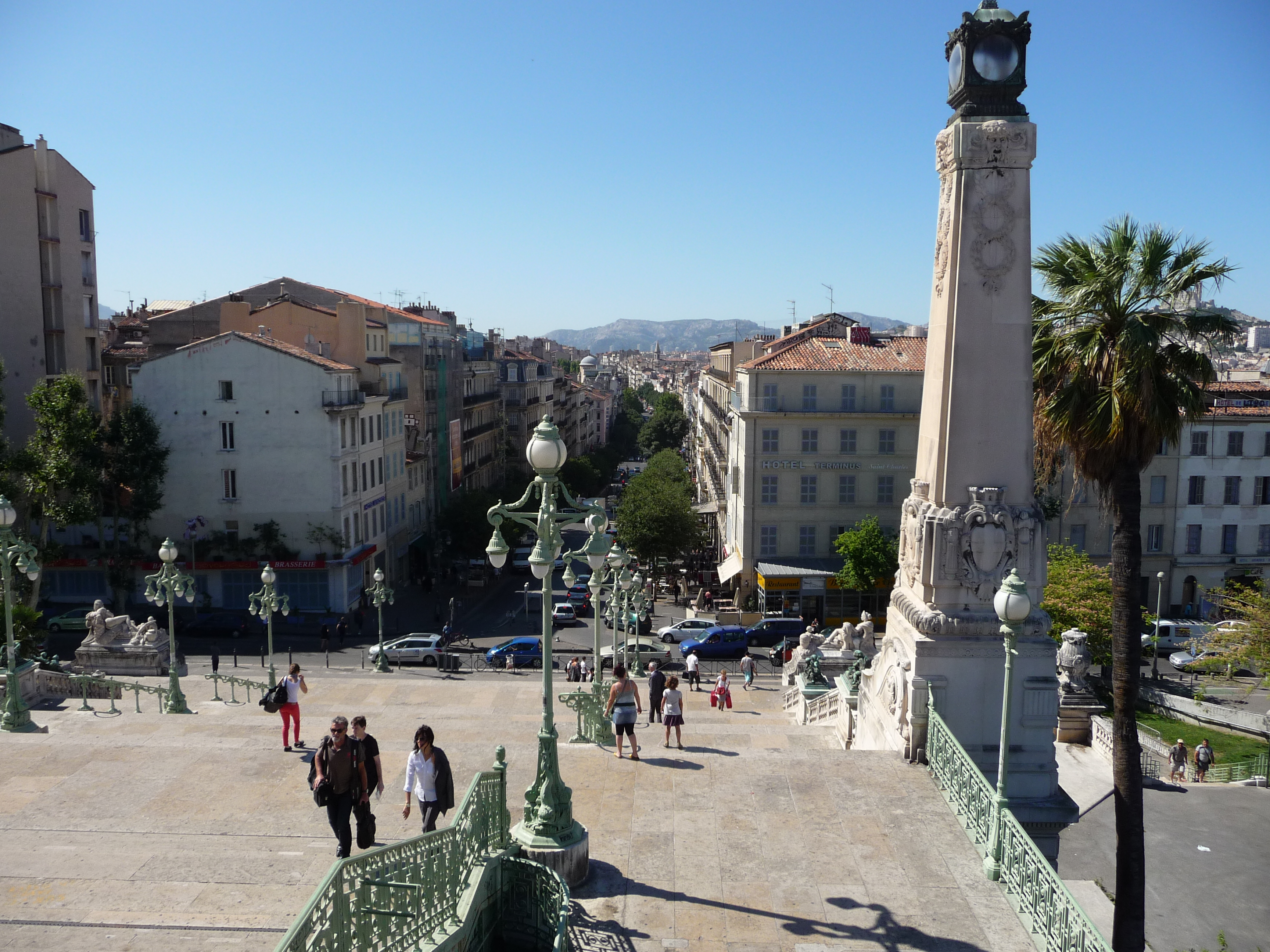 Vue depuis la gare saint charles de Marseille